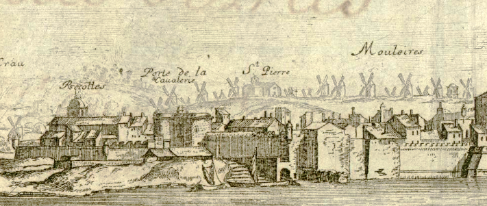 Vue d’Arles en 1660 (détail). Colline du Mouleyres avec ses moulins à vent.